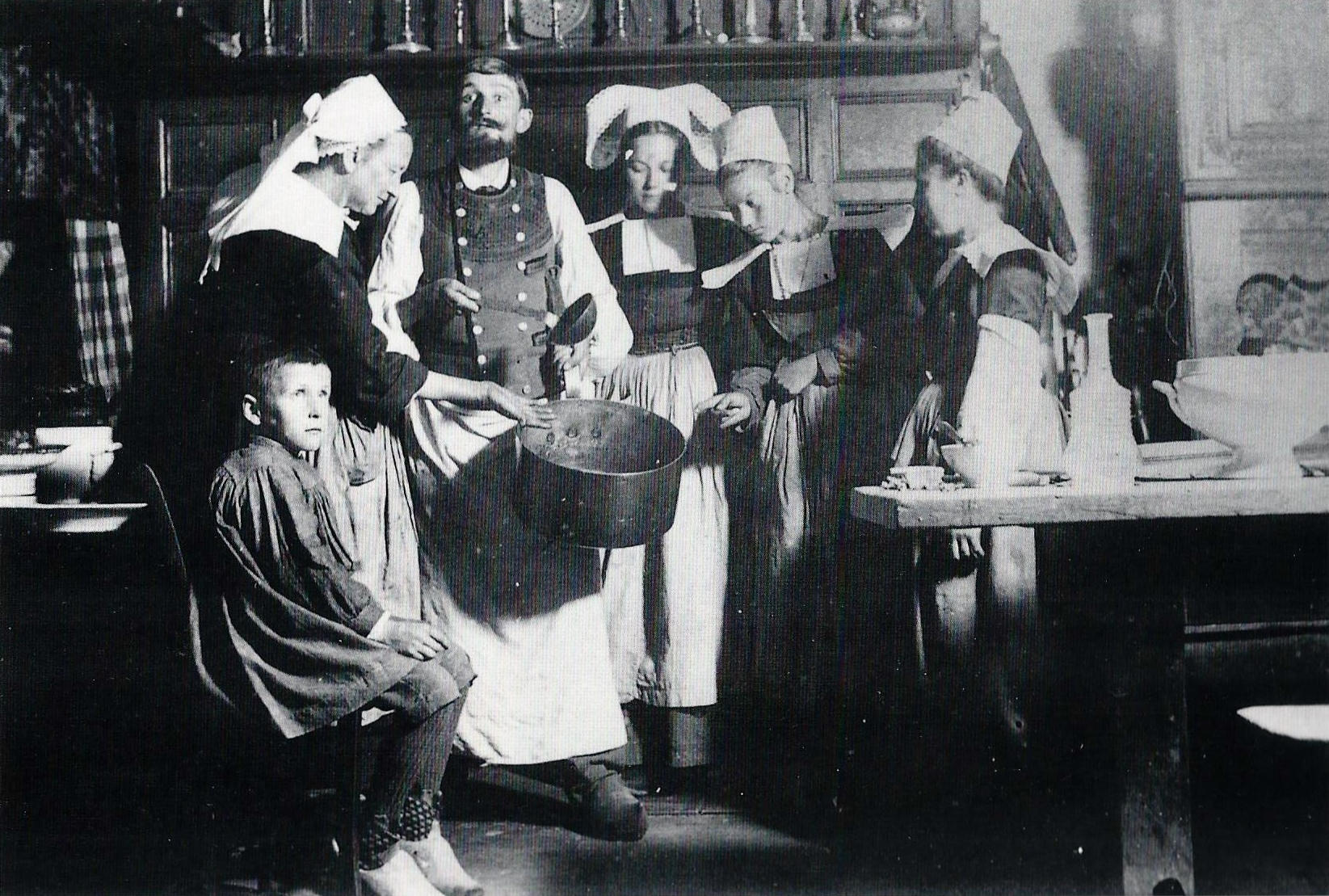 L'intérieur de la pension de Marie-Jeanne Gloanec en 1892 ; l'homme représenté sur la photo serait Paul Gauguin.